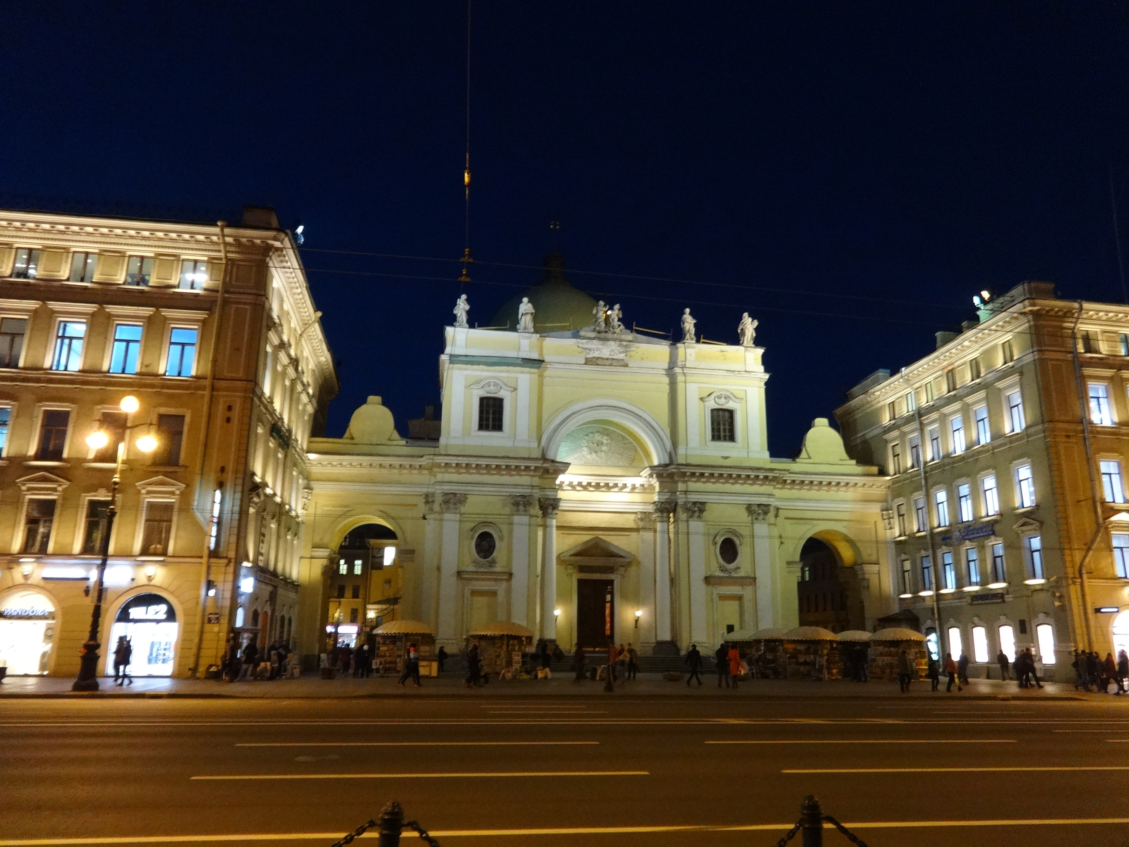 Храм римско-католический церкви Святой Екатерины (Санкт-Петербург, Невский проспект, 32, 34, Итальянская улица, 5)